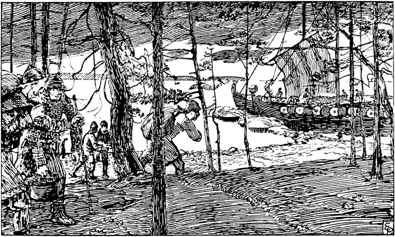 Eilif Peterssen: Illustration for Olav den helliges saga, Heimskringla 1899-edition. nn: «Tore Hund og mennene hans kjem sist til skipa med hærfang.»